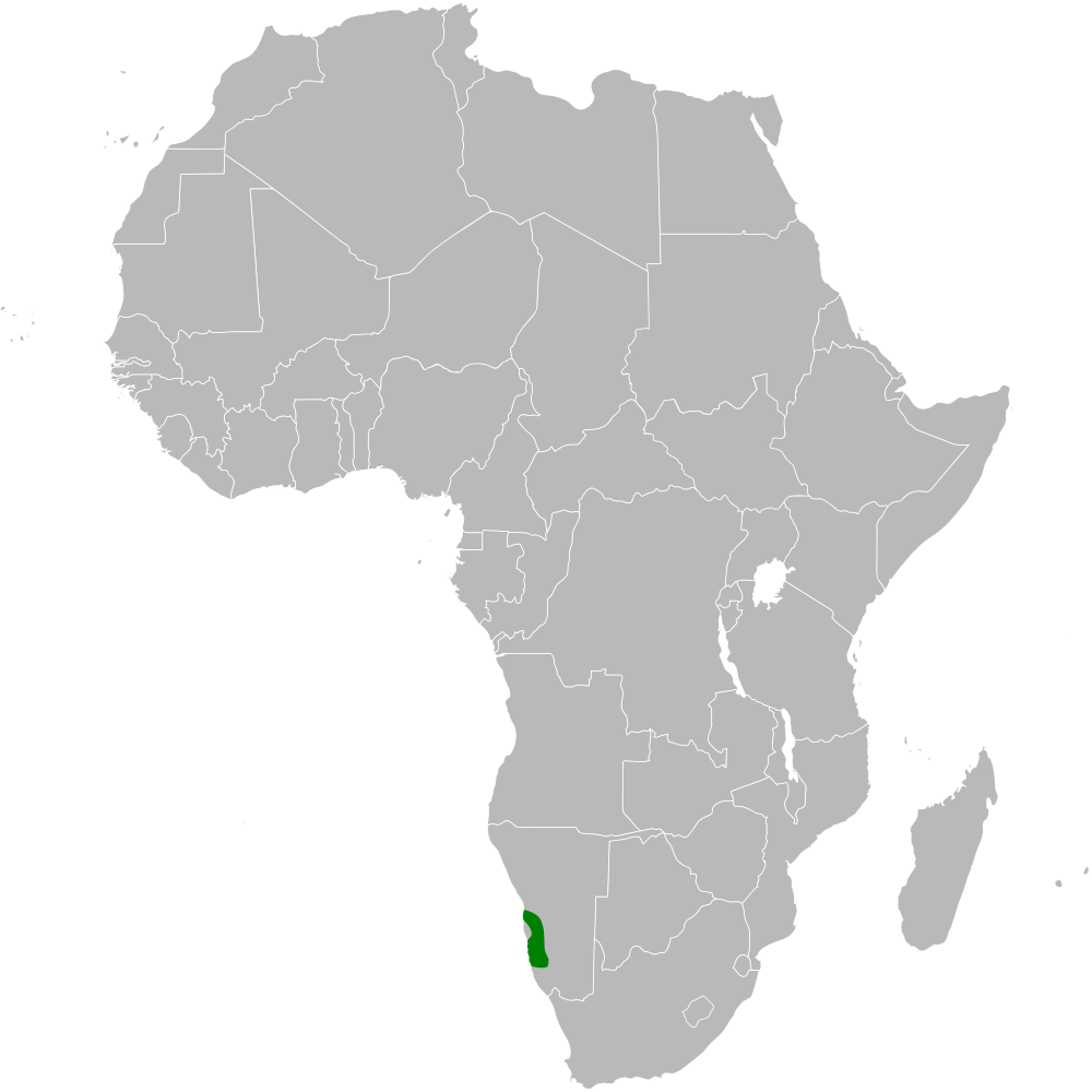 Calendulauda erythrochlamys distribution map, based on